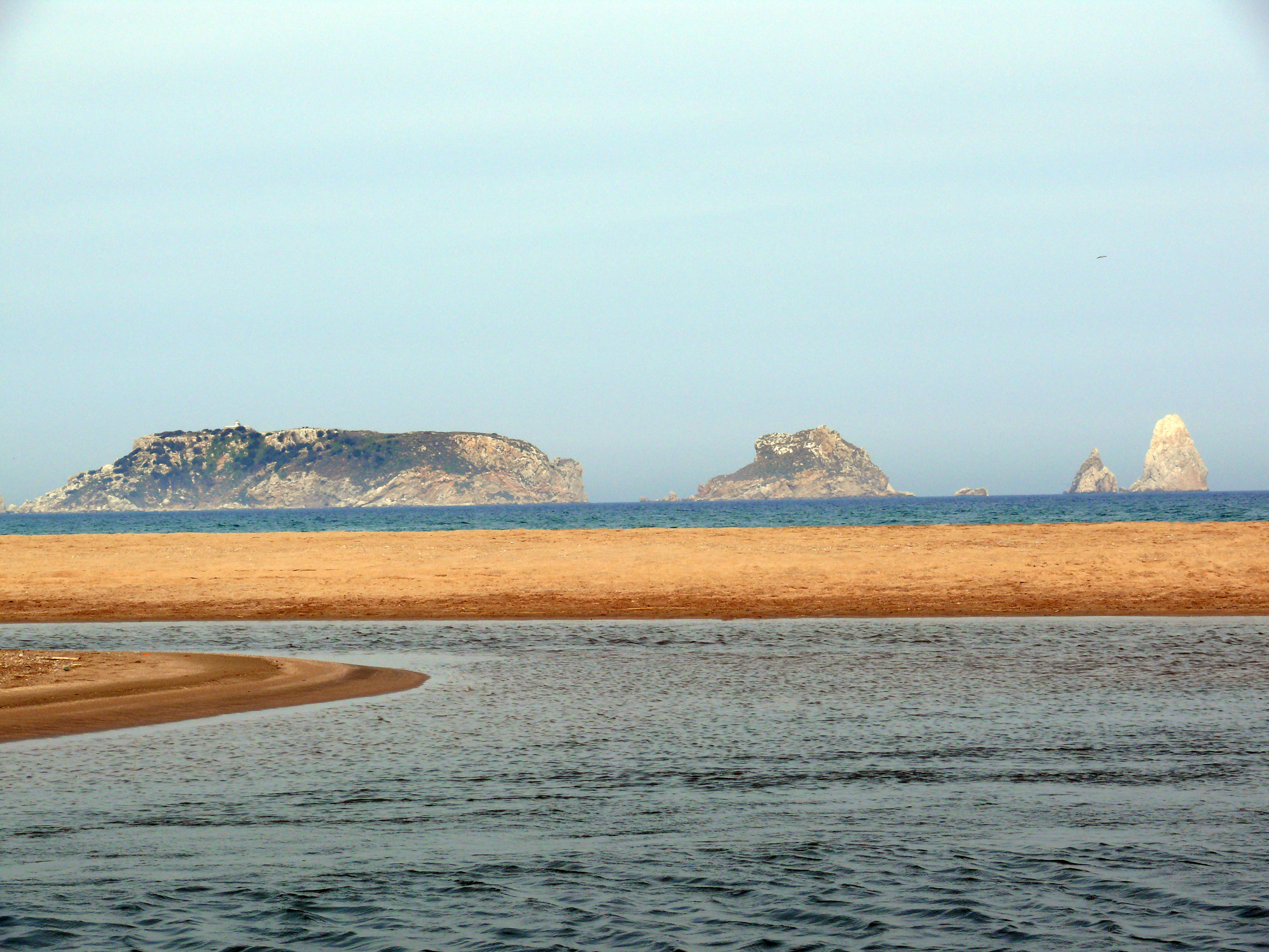 Platja de Mas Pinell (Torroella de Montgrí) This is a a photo of a beach in Catalonia, Spain, with id: PL-CT-17003-322